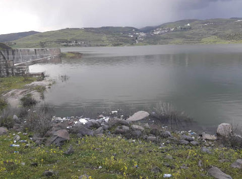 سد المزينة